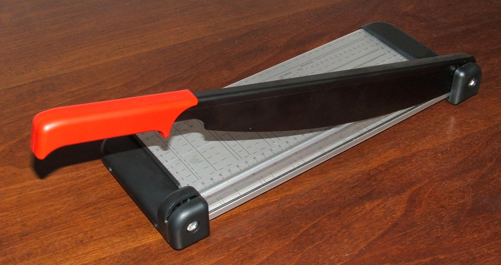 Taglierina